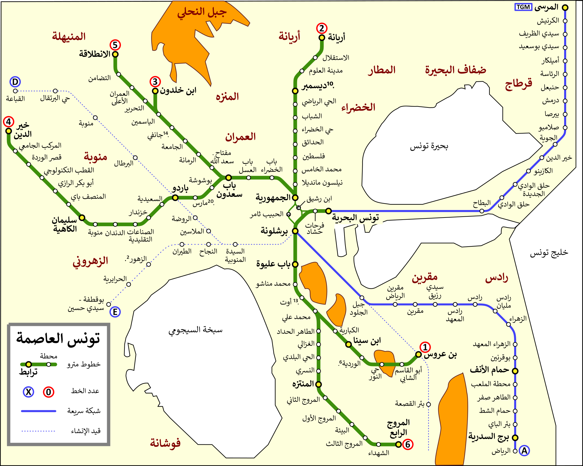 خريطة الخطوط الست للمترو الخفيف لمدينة تونس